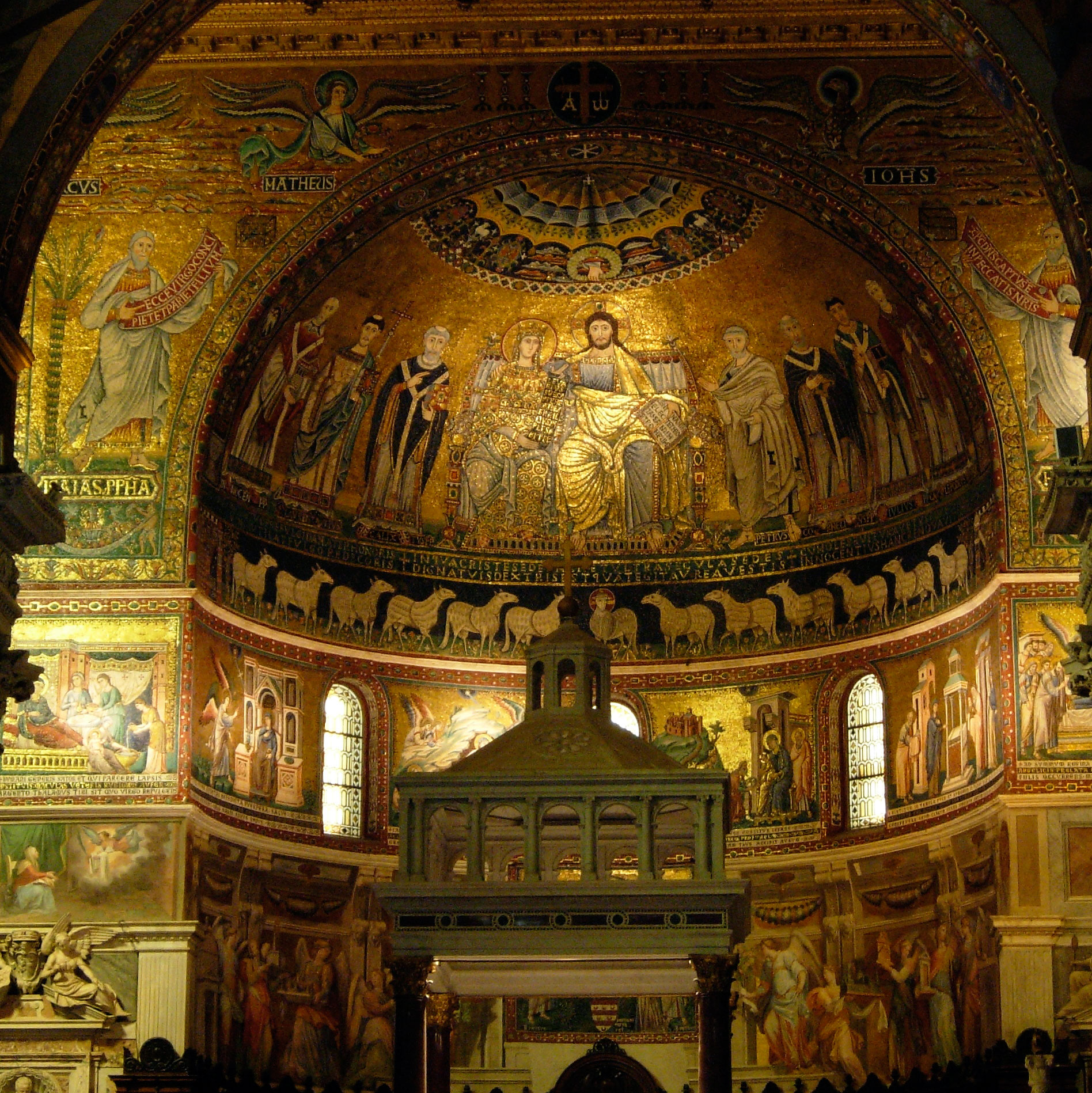 Abside Santa Maria Trastevere Roma